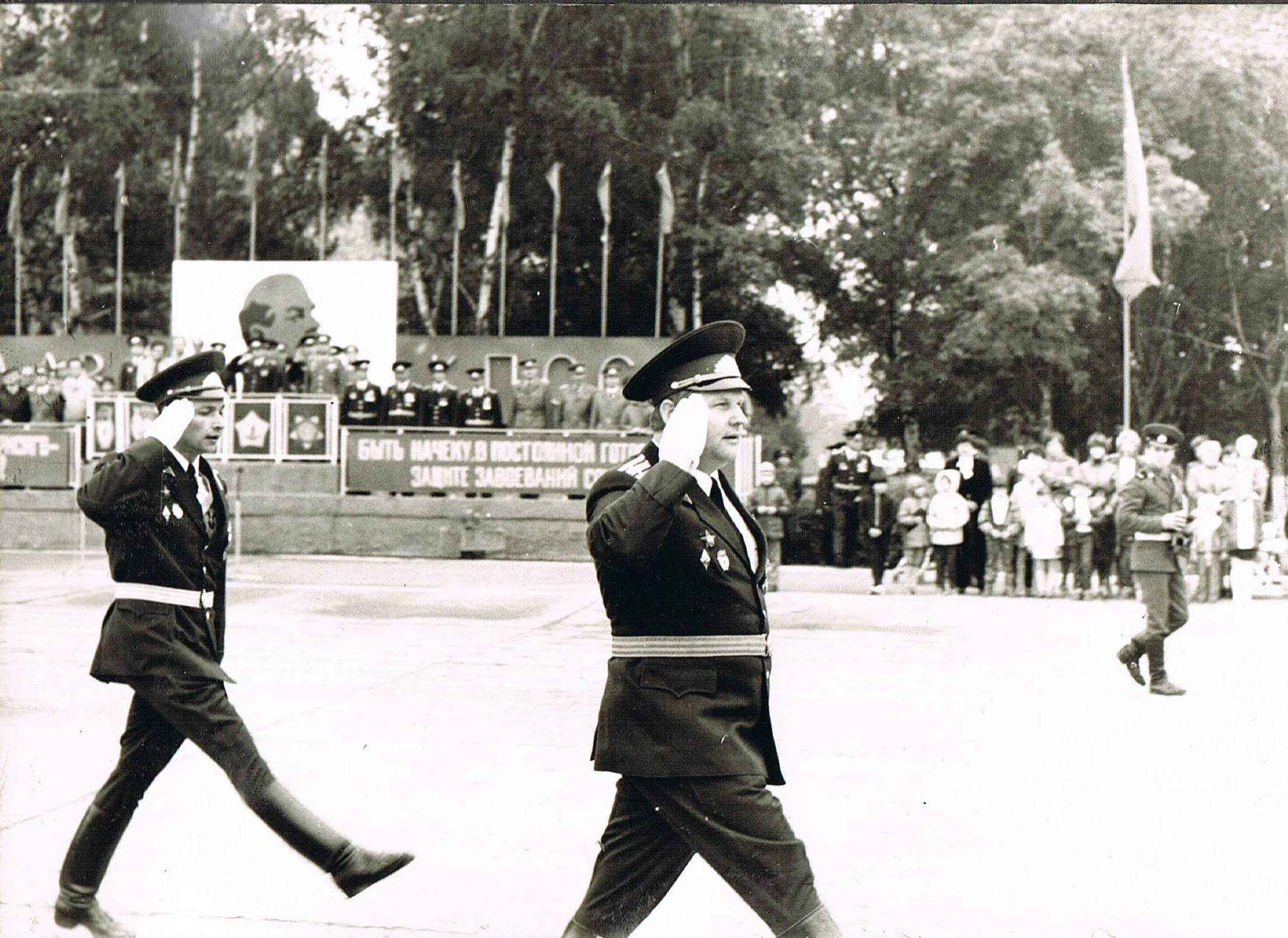 6-я гв. мсд. Обход парадного строя. Комдив А. Дорофеев и начштаба В. Кулаков..Бернау ГДР 1984.